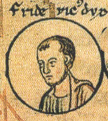 Frédéric II de Lorraine